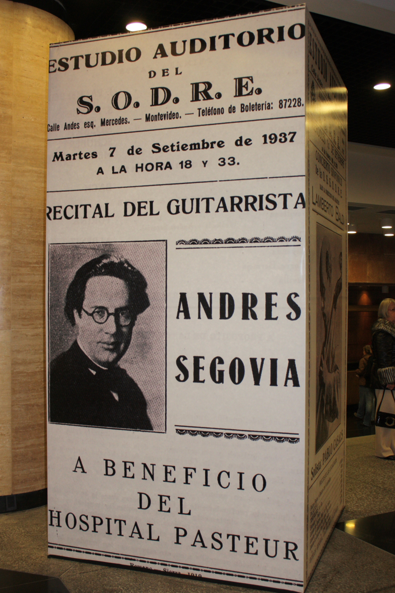 Anuncio para el Recital de guitarra de Andrés Segovia en el Estudio Auditorio del Sodre. 7 de setiembre de 1937.